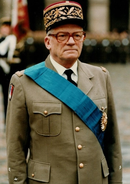 En 1983, en reconnaissance d'une carrière exceptionnelle de 42 années au service de la France, Pierre Brasart est élevé à la dignité de Grand Croix de l'Ordre National du Mérite Cette distinction lui sera remise dans la cour des Invalides par le Président de la République, François Mitterand.